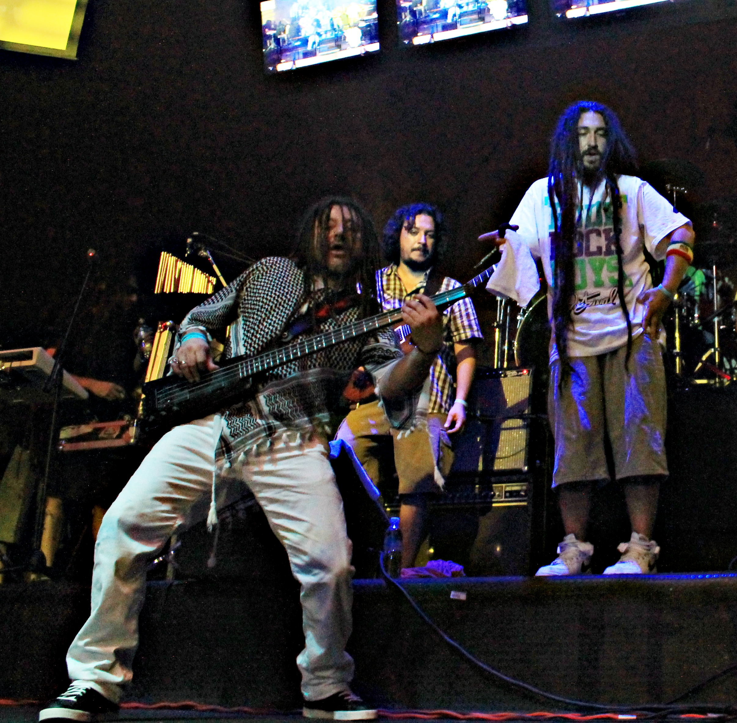 Gondwana En La Gira Del Raztlan Fest 2011 En Cancun Quintana Roo